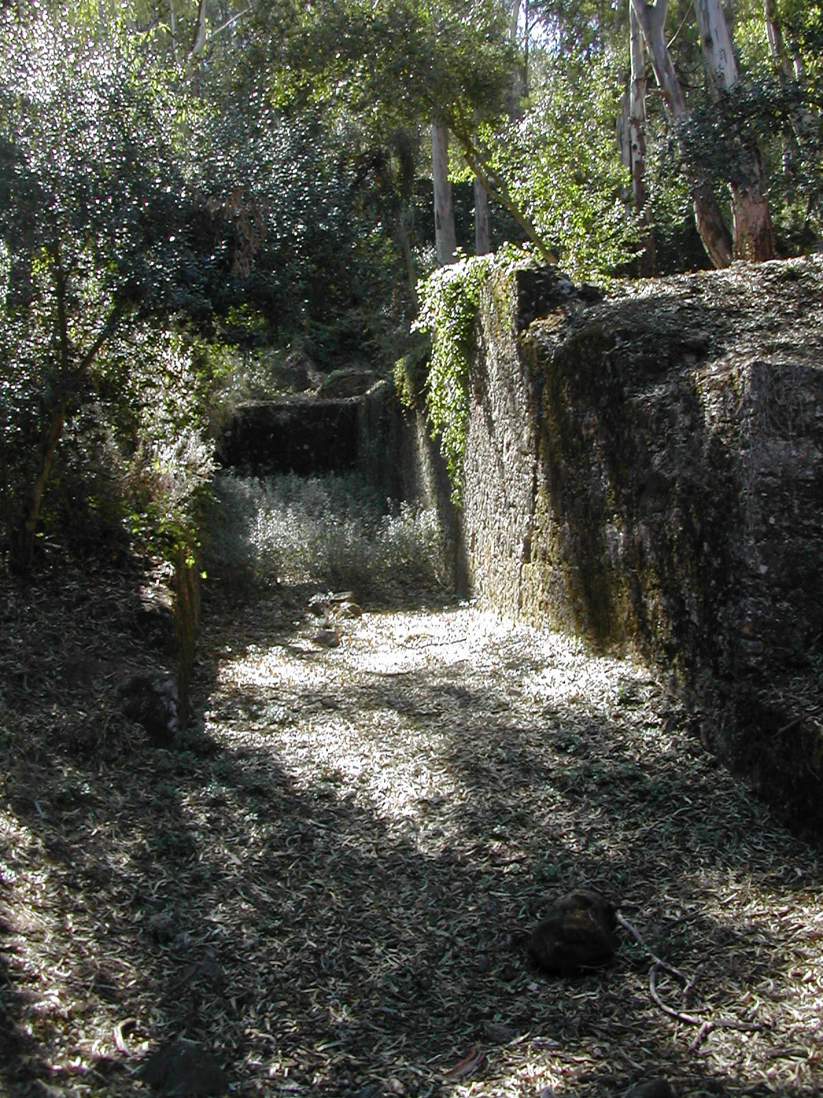 Antiga estrutura de recolha de pedras das antigas pedreiras de Monsanto, Lisboa, Portugal